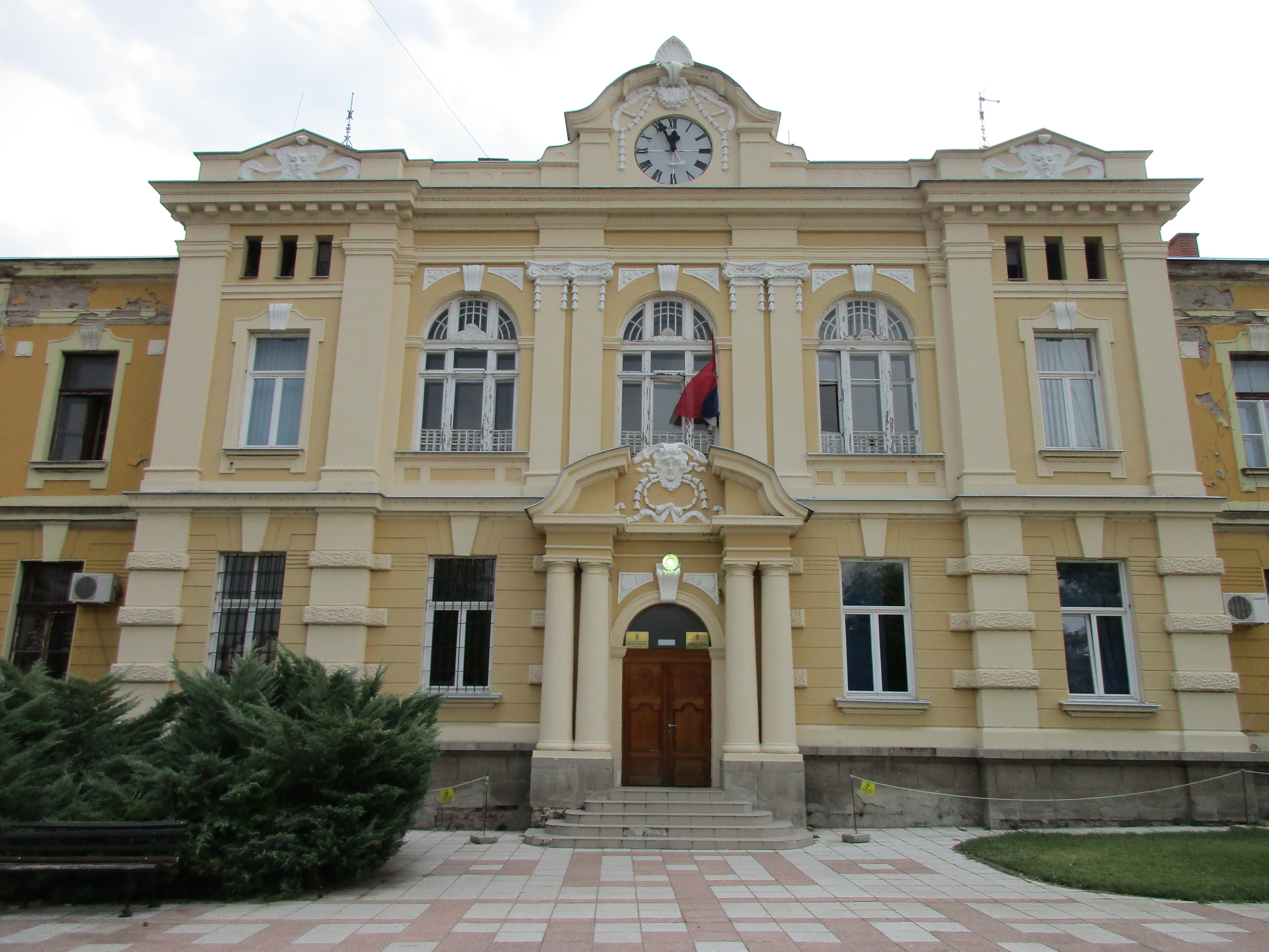 Srpski (latinica): Skupština Opštine Prokuplje